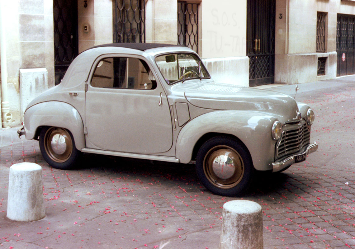 Simca Six, une évolution de la Simca Cinq d'avant-guerre, fabriquée entre 1947 et 1950